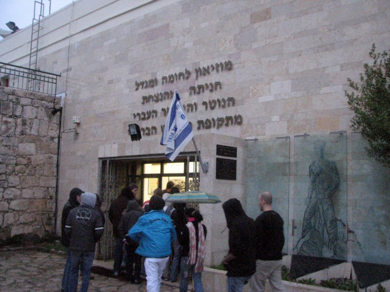 כניסה למוזיאון "חומה ומגדל" שבקיבוץ חניתה רישיון נוצר על ידי משתמש:Andrei